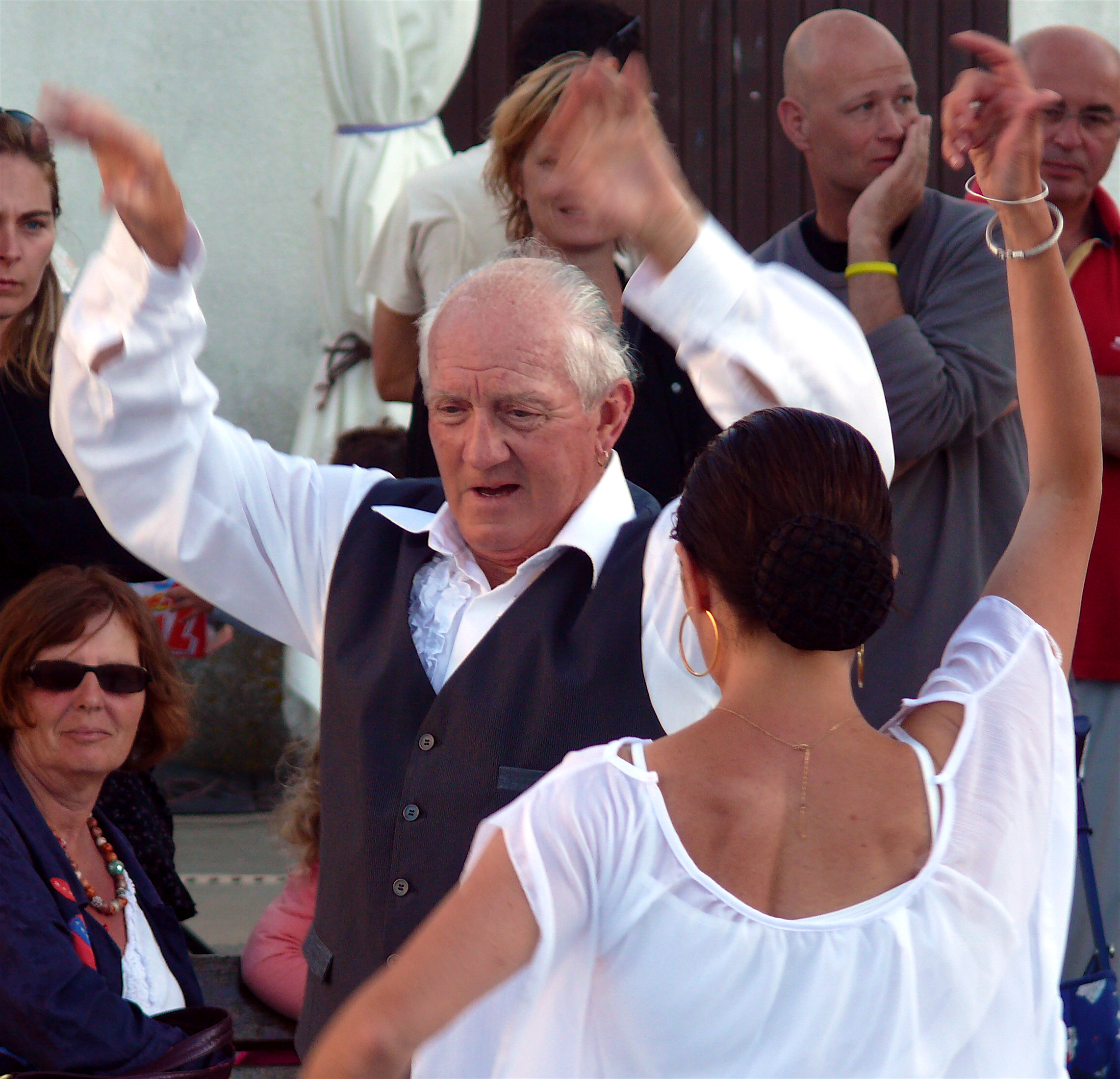 Danse gitane lors du pélerinage des Saintes-Maries-de-la-Mer